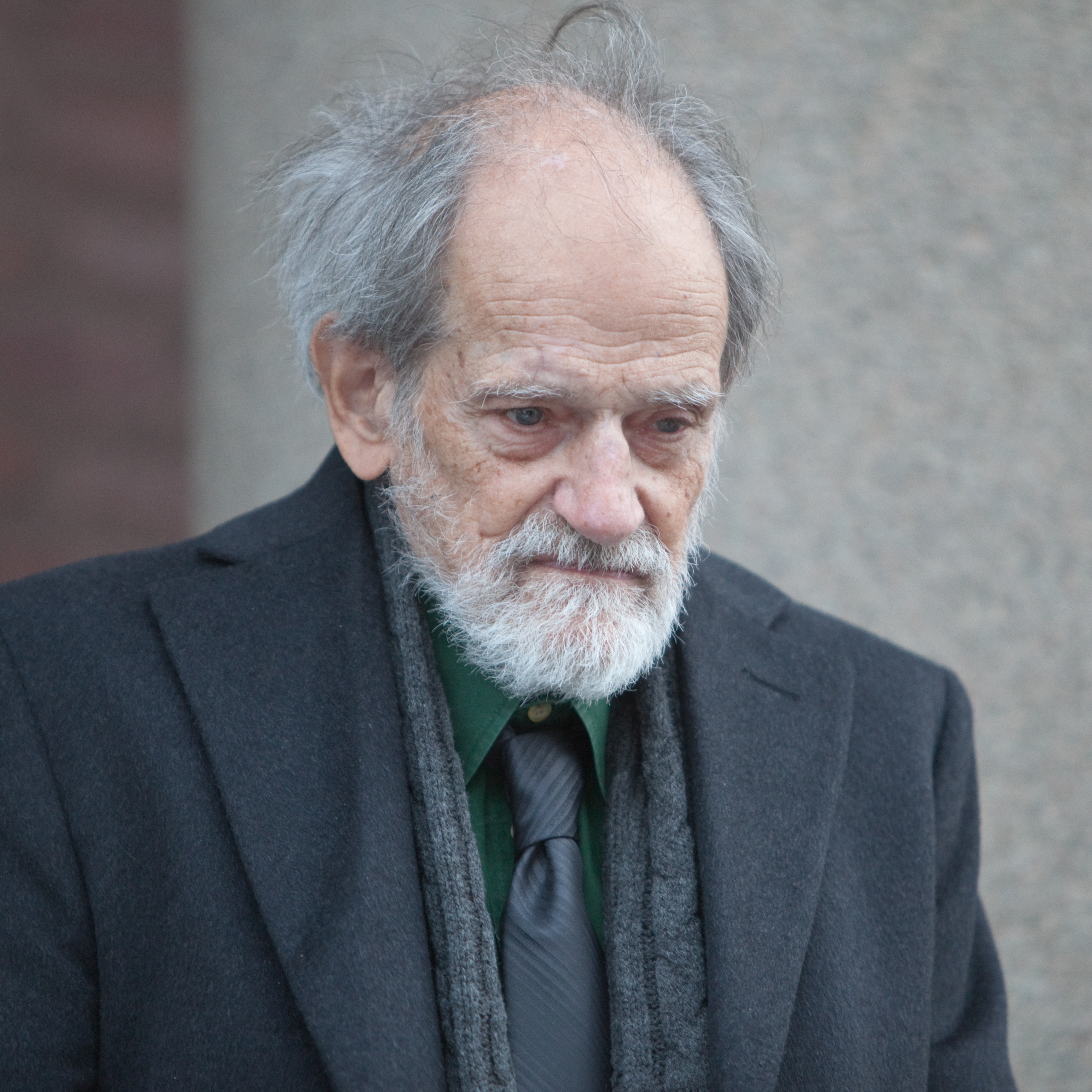 Lloyd Shapley, Nobel Prize Winner 2012 in economics. Sveriges Riksbanks pris i ekonomisk vetenskap till Alfred Nobels minne